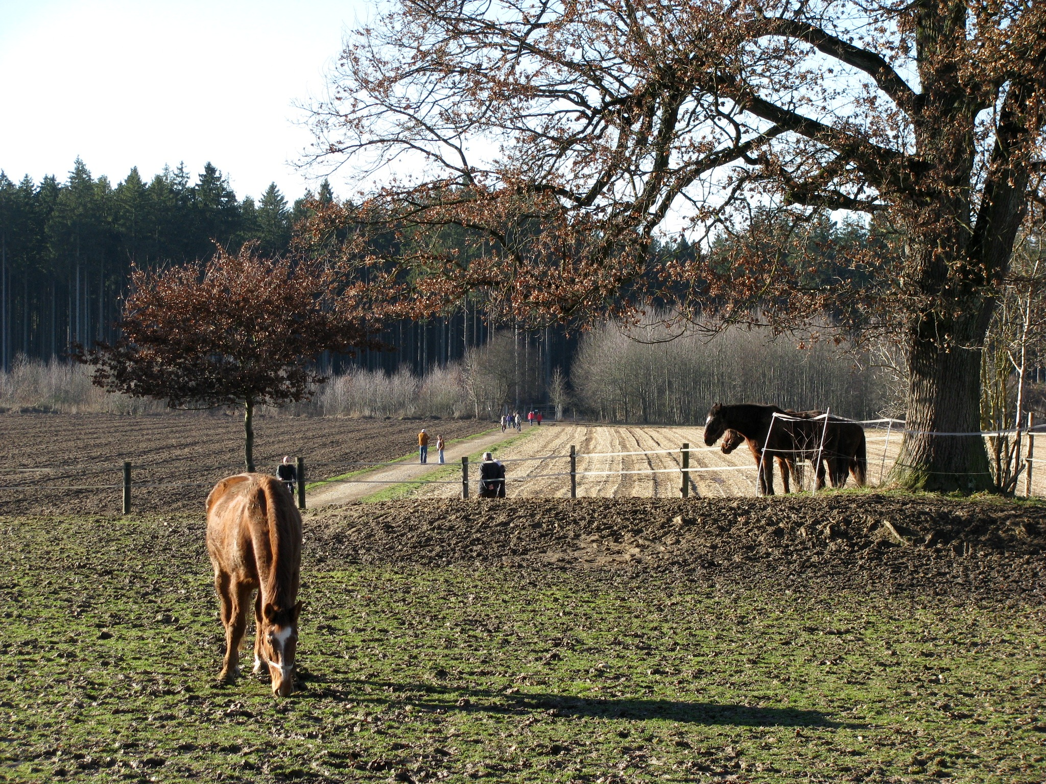 Eingang zum Forstenrieder Park bei Warnberg